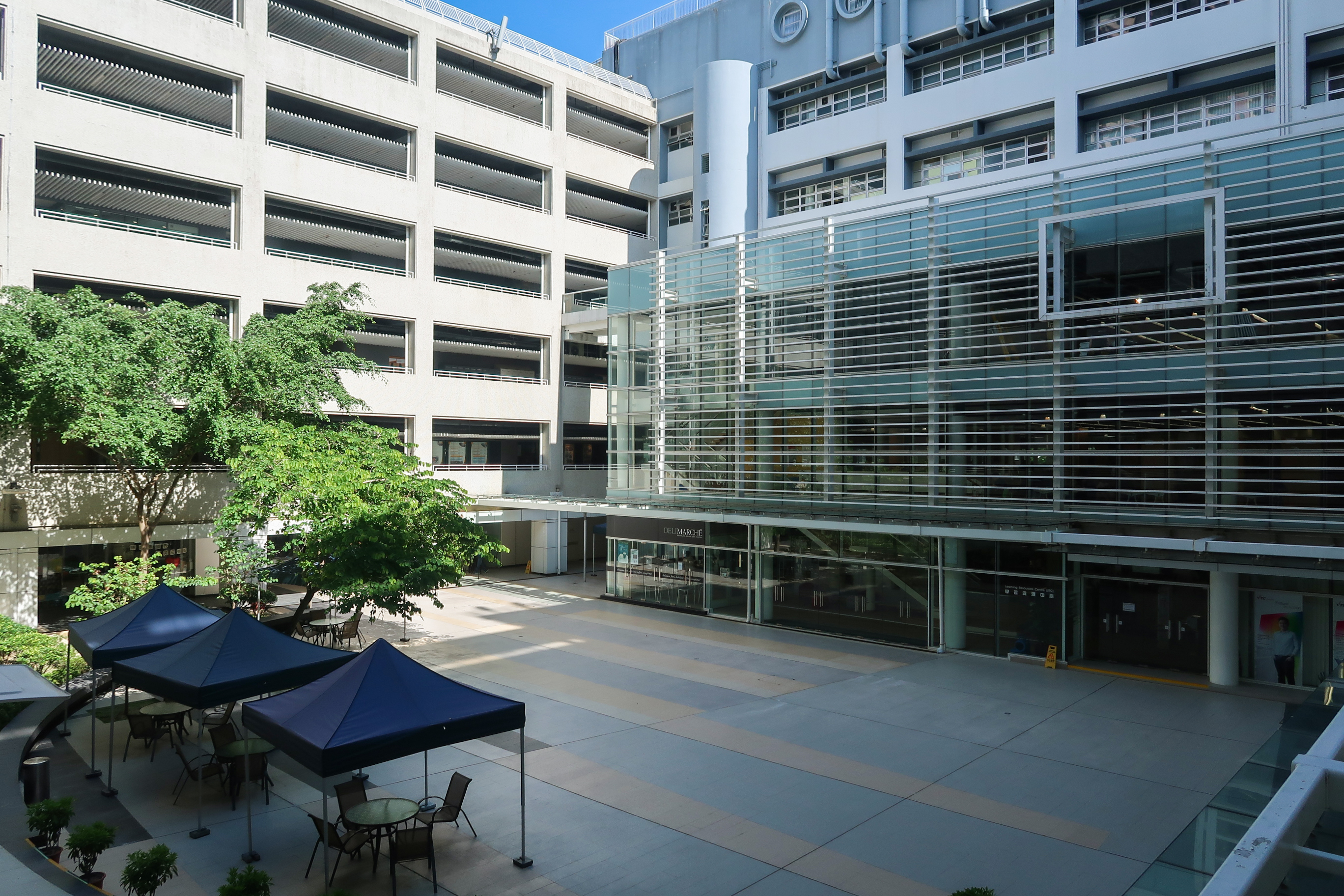 IVE Chai Wan Campus